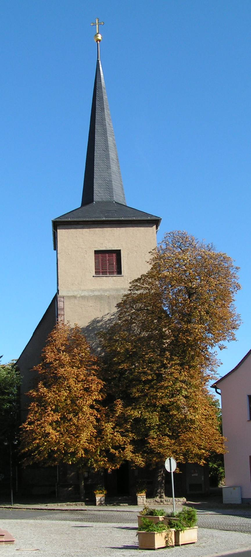 St. Wippertikirche in Kölleda (Thüringen, Deutschland)